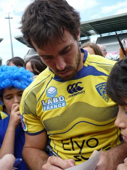 Brock James sollicité par ses fans après un match au Stade Marcel Michelin avec l'ASM Clermont Auvergne